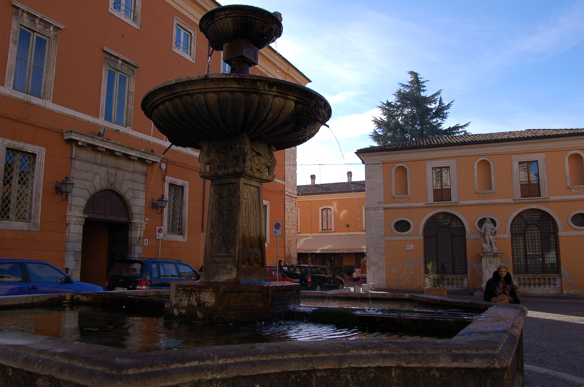 L'Aquila, Italia; piazza Santa Margherita, palazzetto dei Nobili